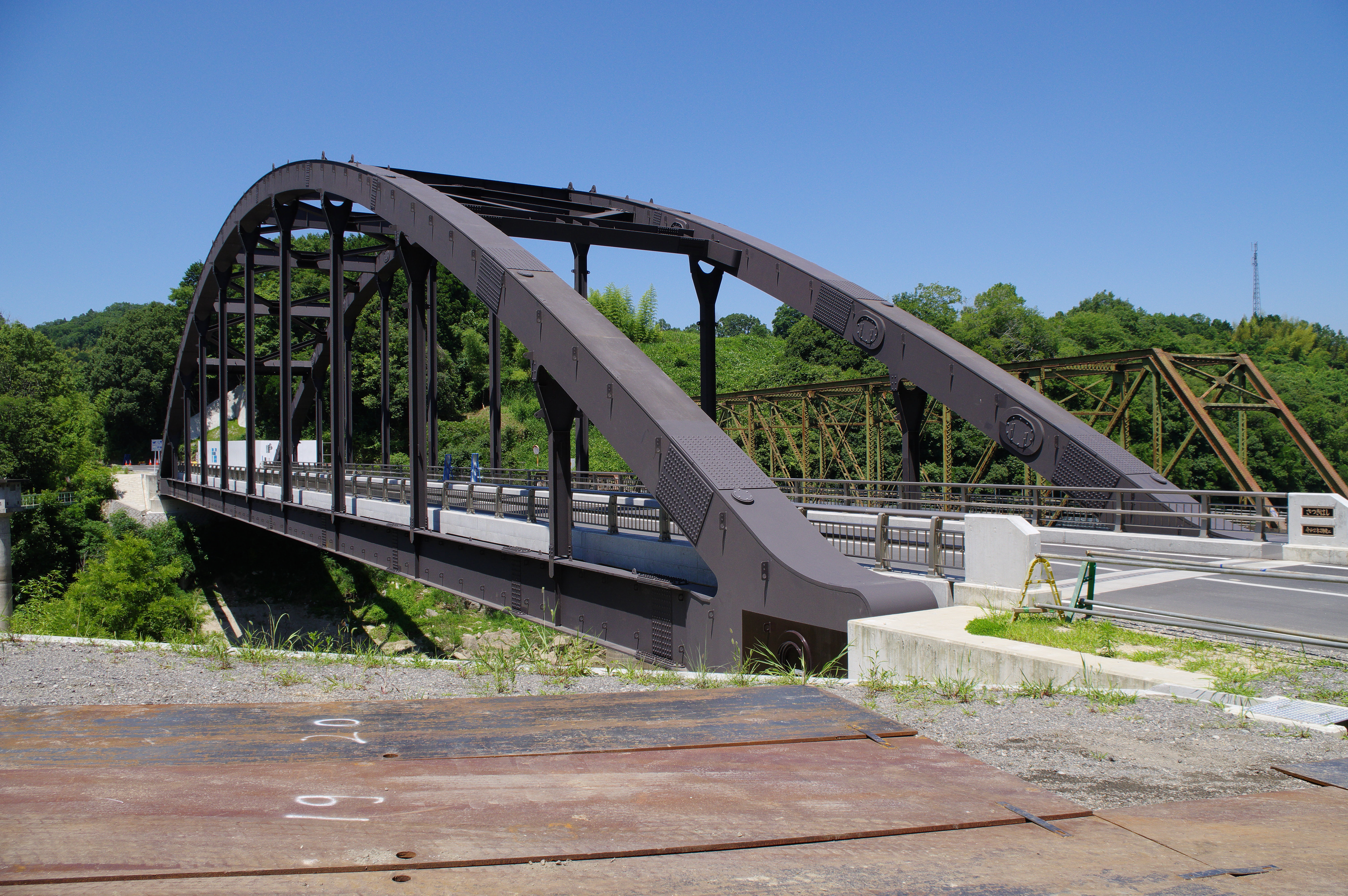 国道25号線 五月橋 2020年2月竣工 奈良県山辺郡山添村 三重県伊賀市治田